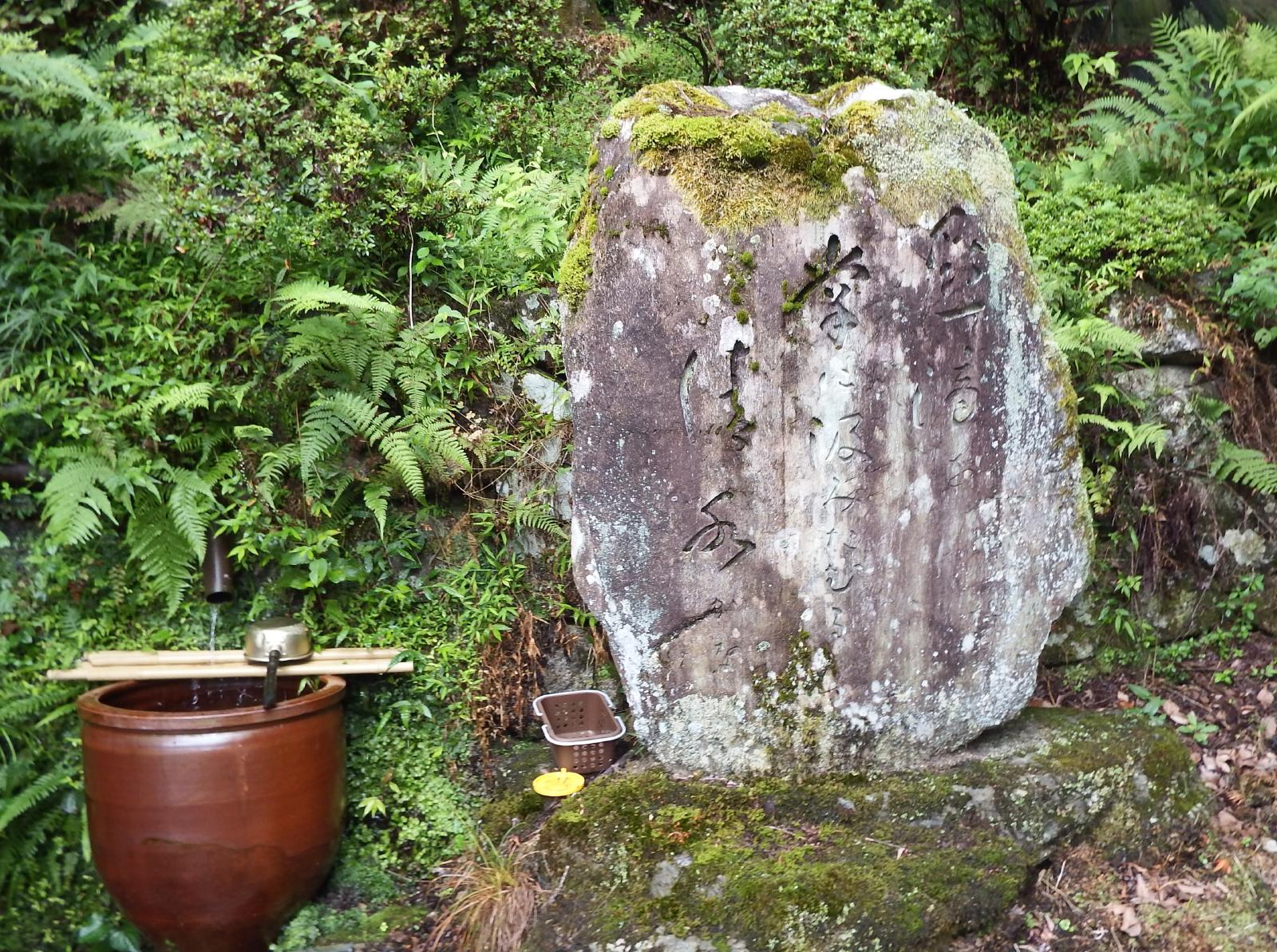 西山興隆寺の句碑の一つ